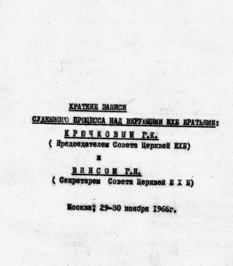 Обложка машинописной брошюры с материалами судебного процесса над Г. П. Винсом и К. Г. Крючковым после акции протеста евангельских христиан баптистов против вмешательства государства в дела Церкви и религиозных преследований перед зданием ЦК КПСС в 1966 году. Материалы распространялись среди верующих